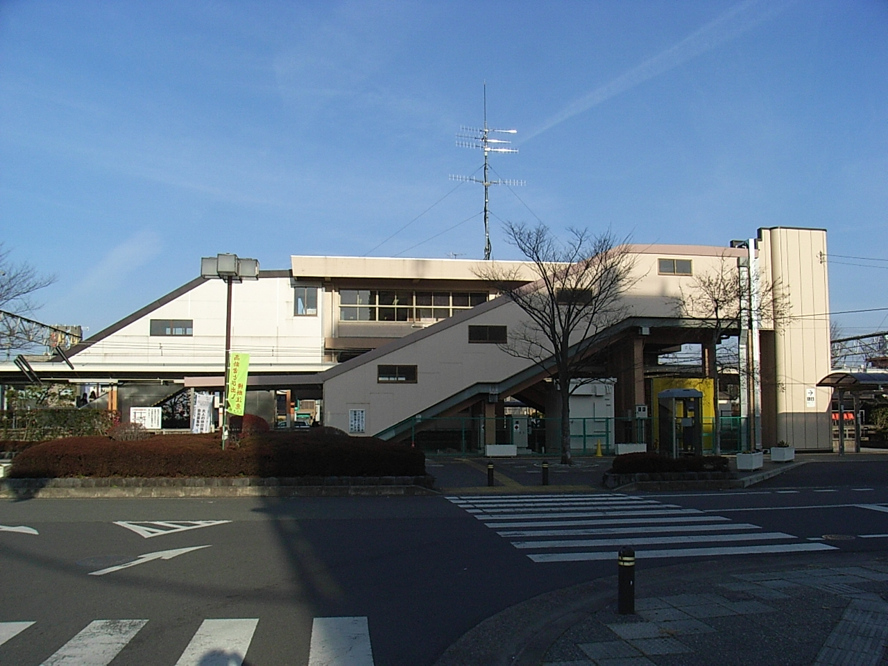 Gyoda Station (West Entrance) on JR Takasaki Line. (12,Ichiriyamacho,Gyoda-shi,Saitama-ken,JAPAN)